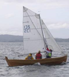 Oselver with sprisail (Detail)